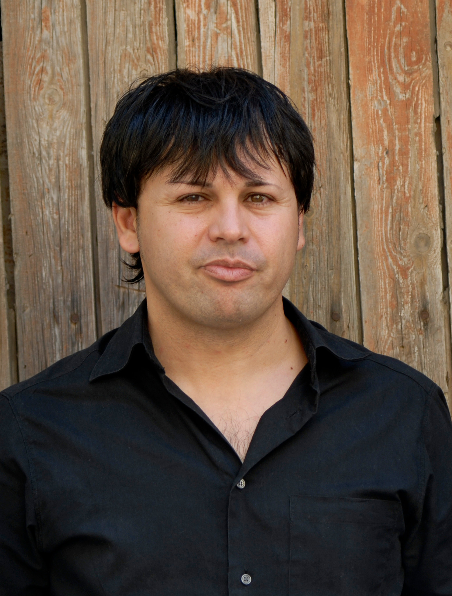 Fotografía del escritor Oscar Sipán